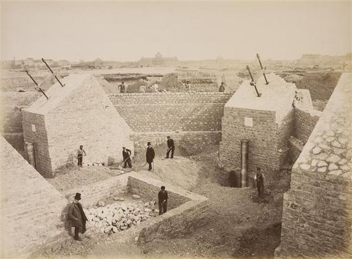 Musée d'Orsay Native nameMusée d'OrsayLocationParisCoordinates48° 51′ 36″ N, 2° 19′ 37″ E Established1986Website control VIAF: 130307757 ISNI: 0000 0001 2157 2575 ULAN: 500310001 LCCN: n84128587 NLA: 36024323 WorldCat Pierre Petit (1832–1909) Alternative namesPierre PetitDescription French photographer Date of birth/death18321909Location of birth/deathAups, FranceParisWork period1848 – 1908Work locationFrance, New York (Statue of Liberty)Authority control VIAF: 100987556 ISNI: 0000 0000 8008 6705 ULAN: 500028356 LCCN: n87810036 GND: 174256957 WorldCat épreuve sur papier albuminé Don Famille Granet, 1981 Hauteur : 0.28 m Largeur : 0.372 m